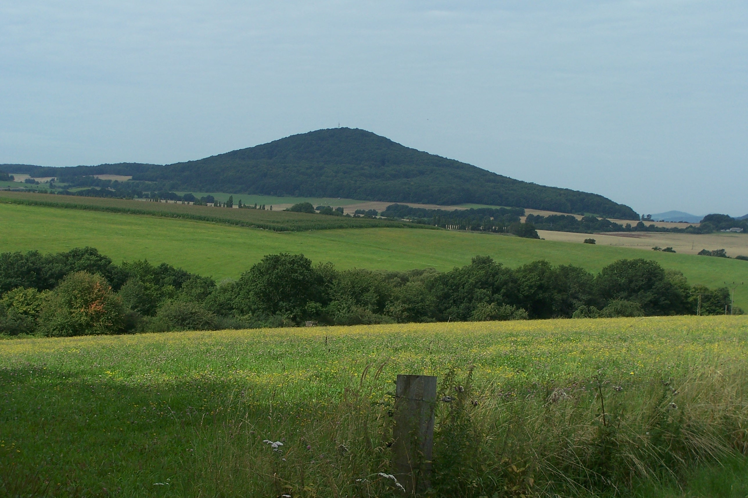 Der Arzberg in der Rhön - von Osten (Gehaus).